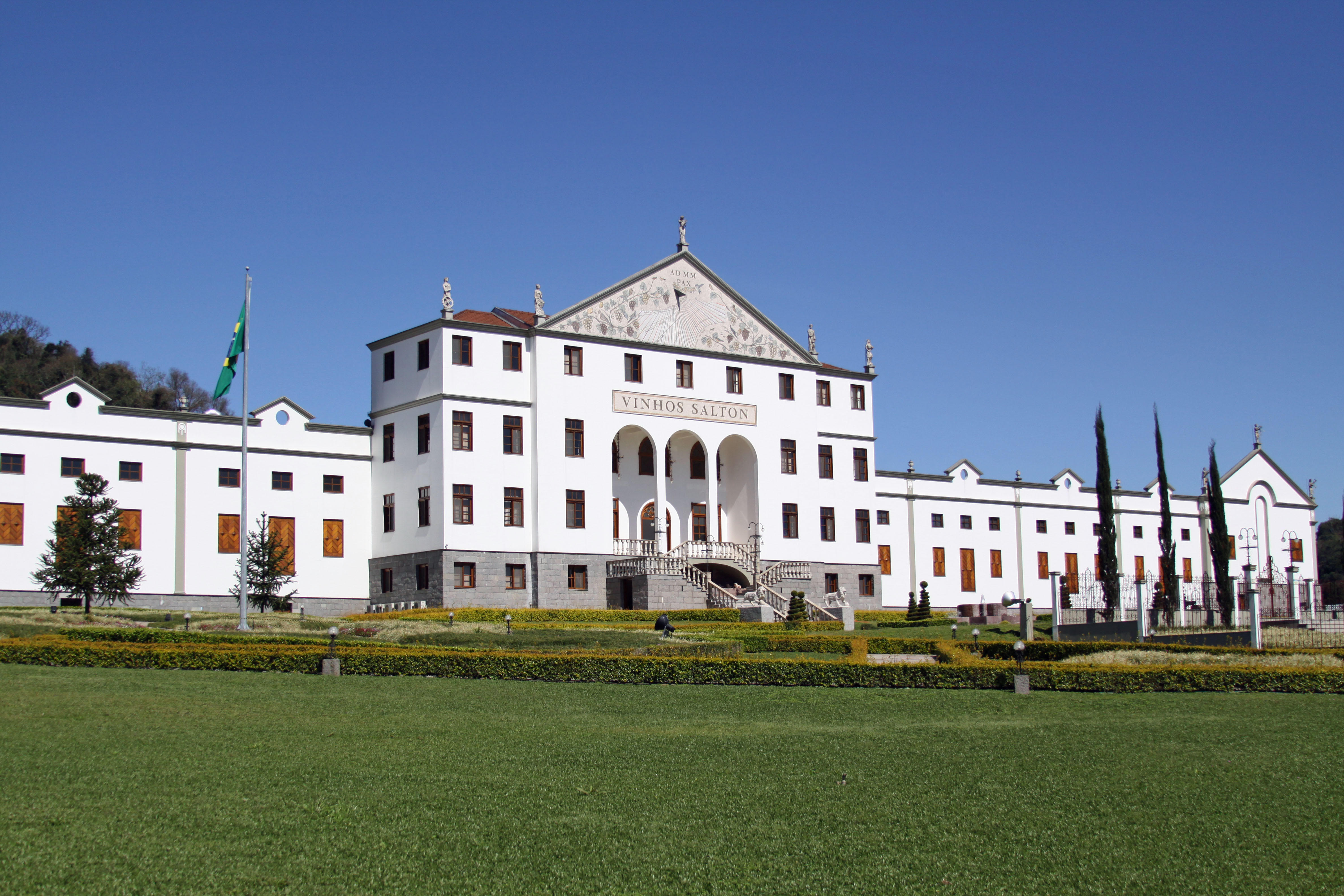 Vinhos Salton em Bento Gonçalves